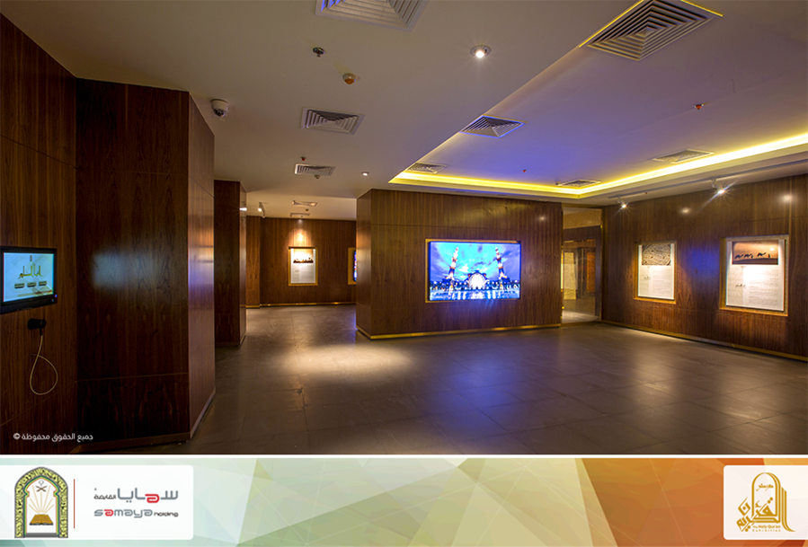 صورة من قاعة النبأ العظيم